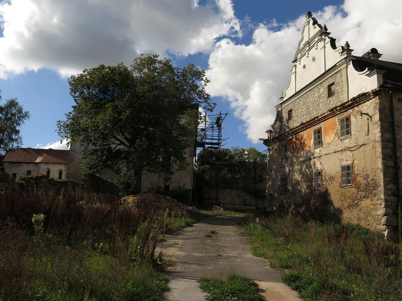 Zámek Bratronice, Bratronice čp. 1, 45, 46, 47, 48, Bratronice (okres Strakonice).